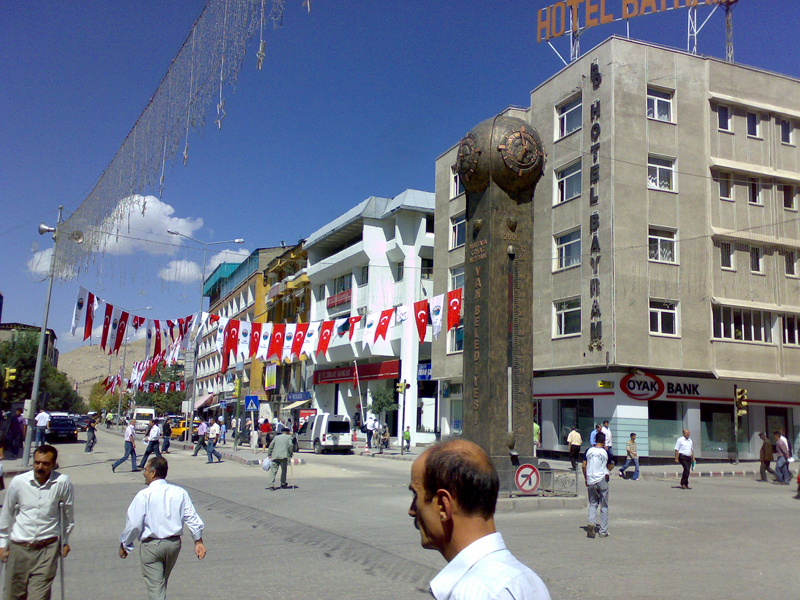 مرکز شهر وان